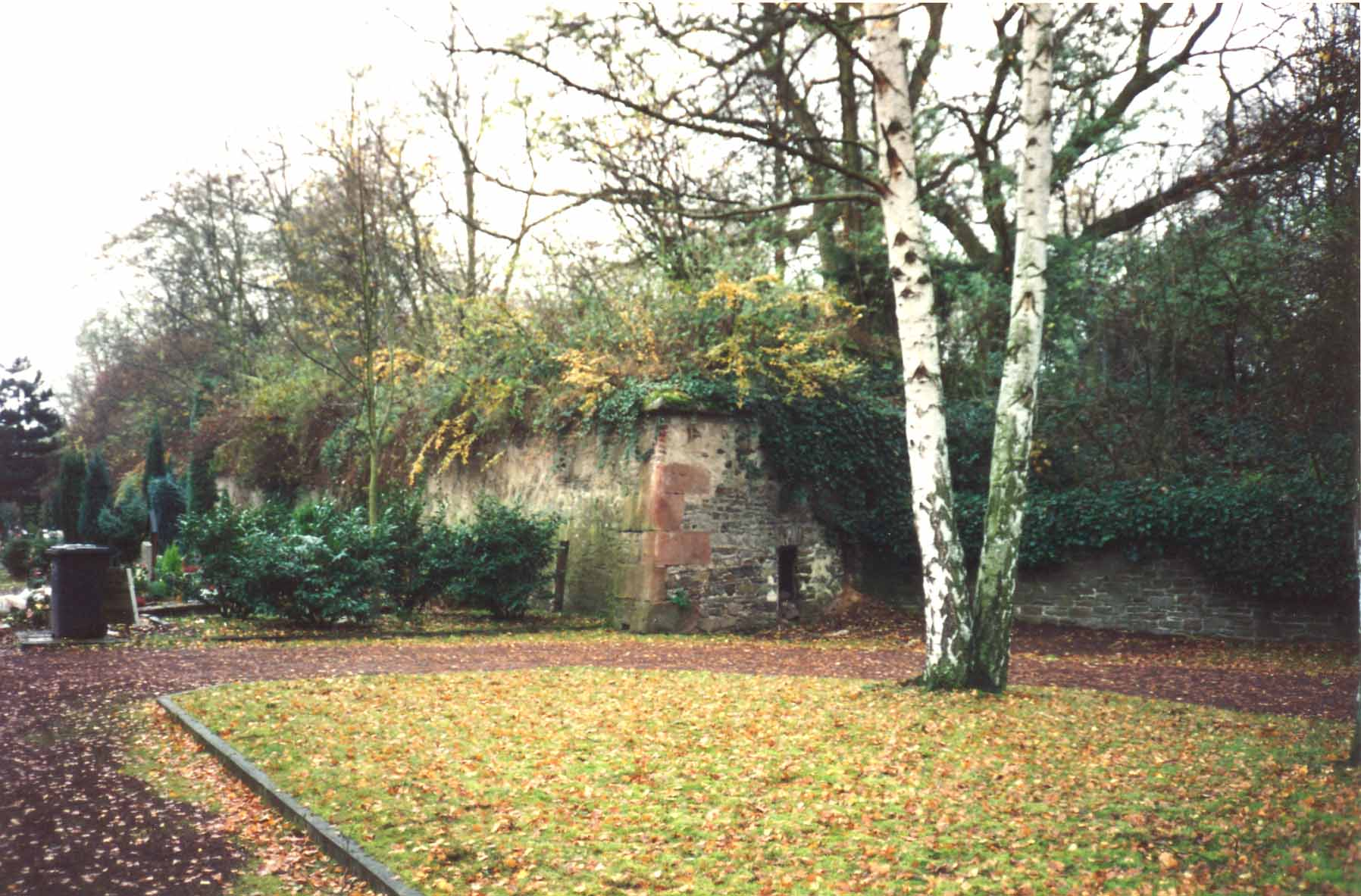 Reste der Escarpe auf dem heutigen Lützeler Friedhof.